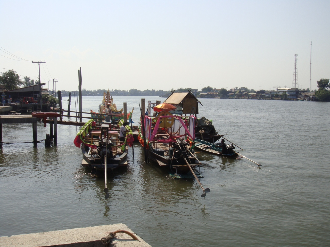 ท่าขึ้นลงเรือบริเวณหน้าวัด